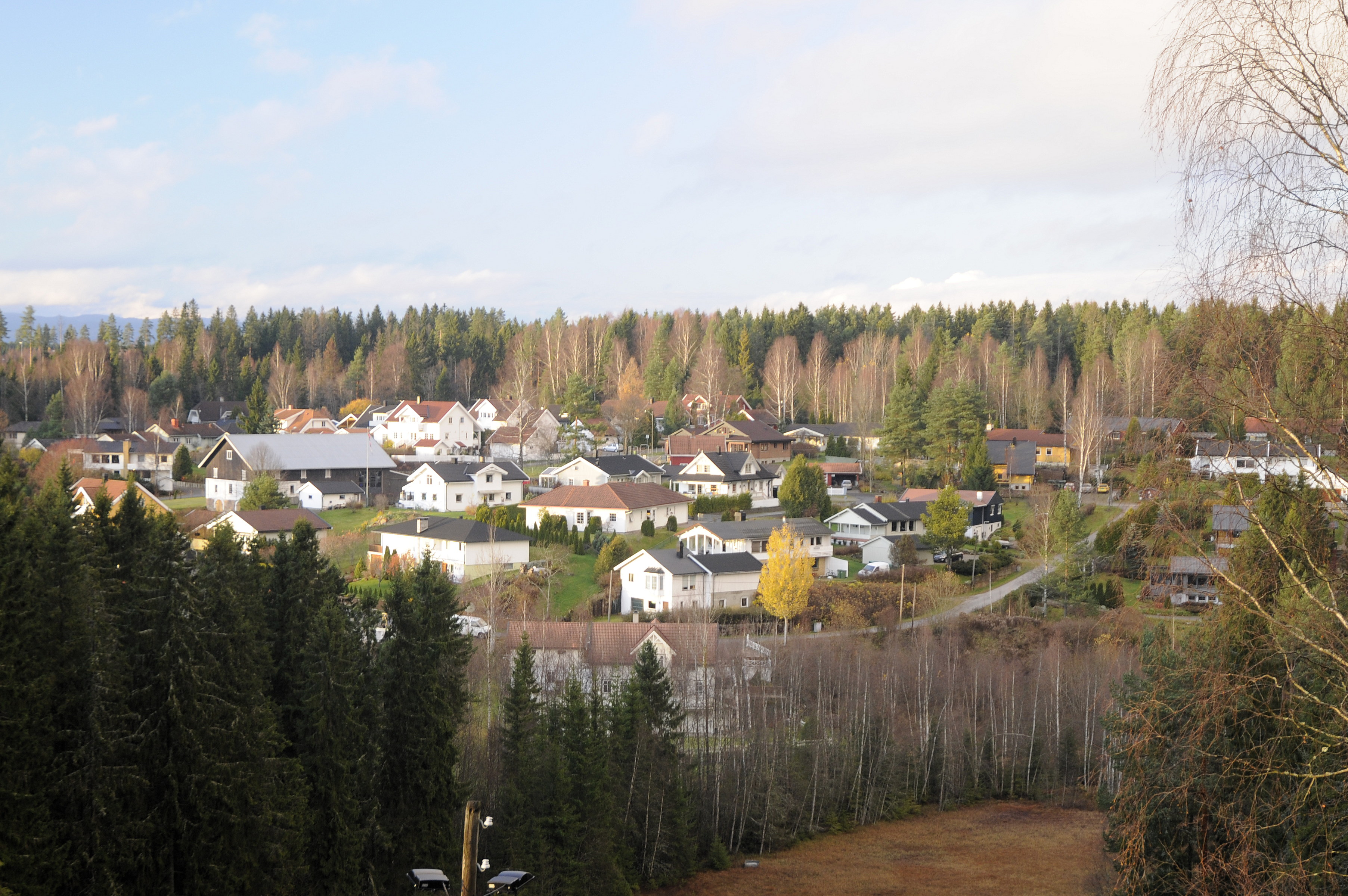 Kverndalen på Jessheim